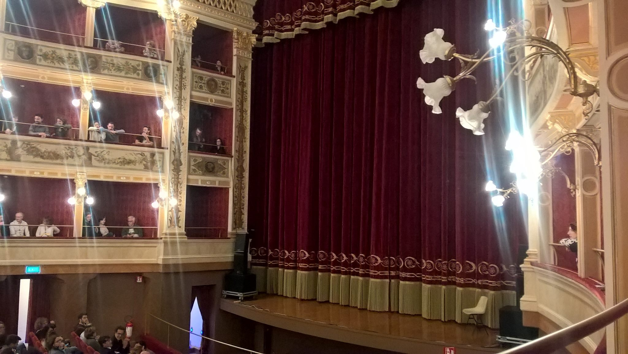 Vista del Teatro Comunale di Siracusa in tutto il suo splendore da uno dei palchetti This is a photo of a monument which is part of cultural heritage of Italy.